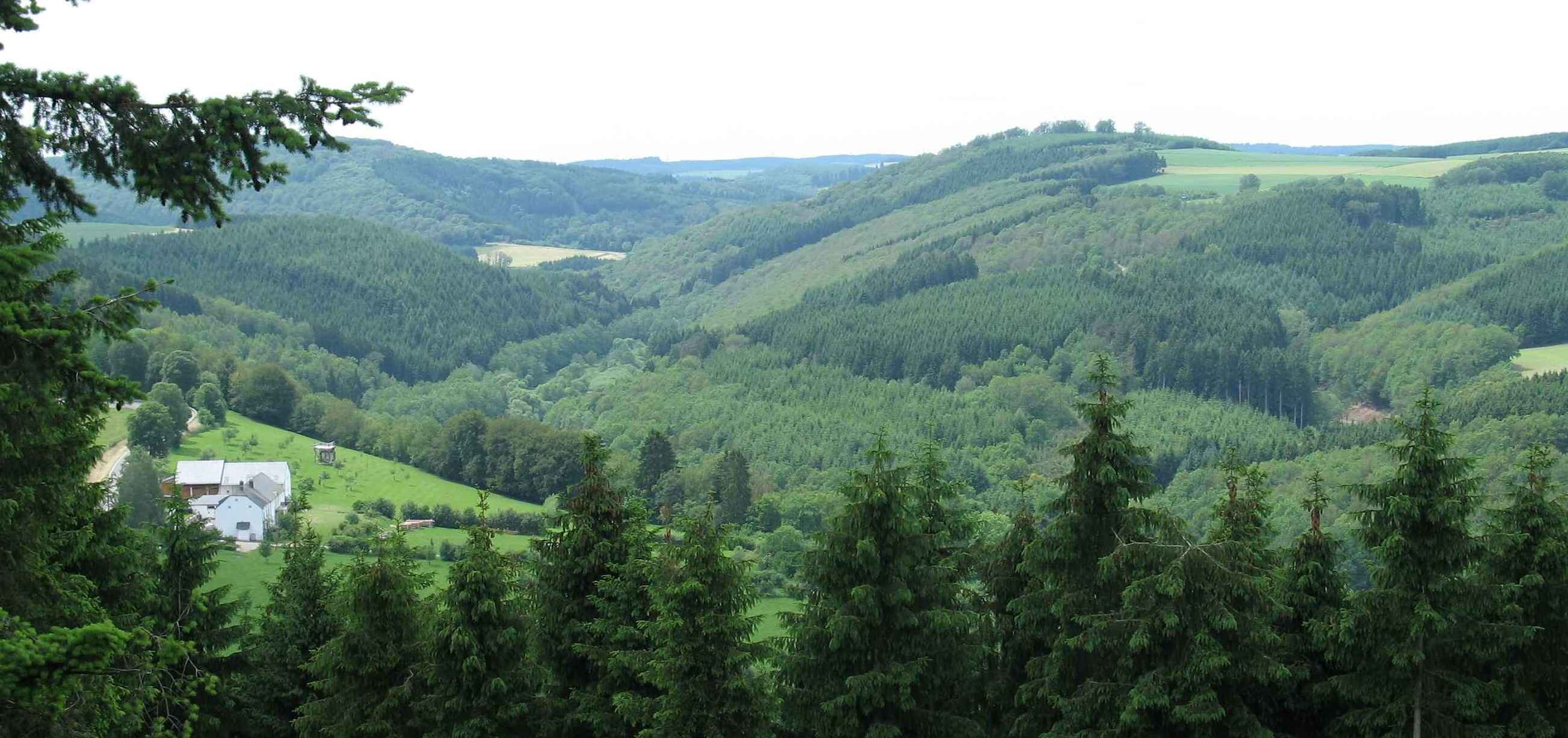 Éislek an der Géigend vun der Misärsbrëck (Lëtzebuerg)